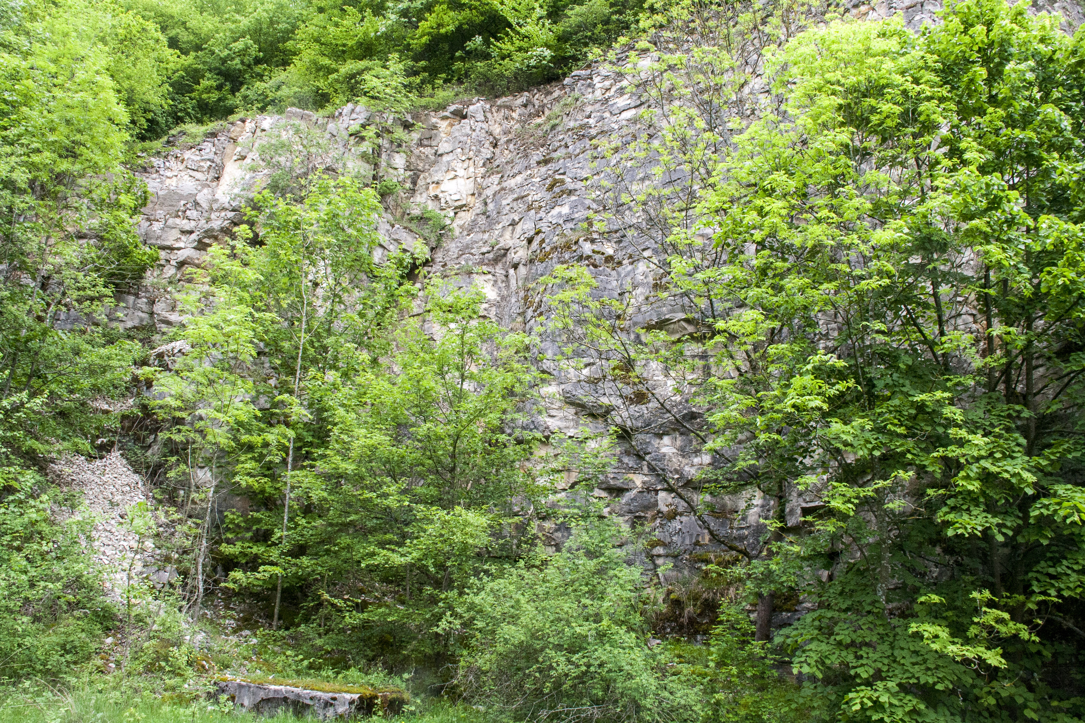 Steinbruch, Happurg, Geotop, Ausweisung des LSG "Südlicher Jura mit Moritzberg und Umgebung"